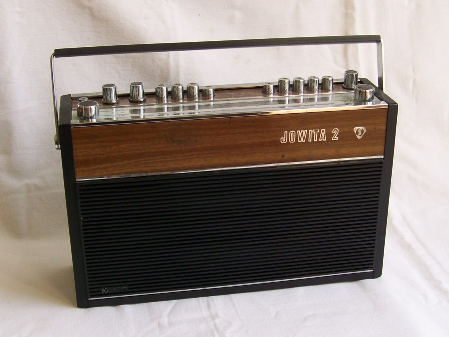 Radio Jowita 2. Zdjęcie ze strony oldradio.pl.